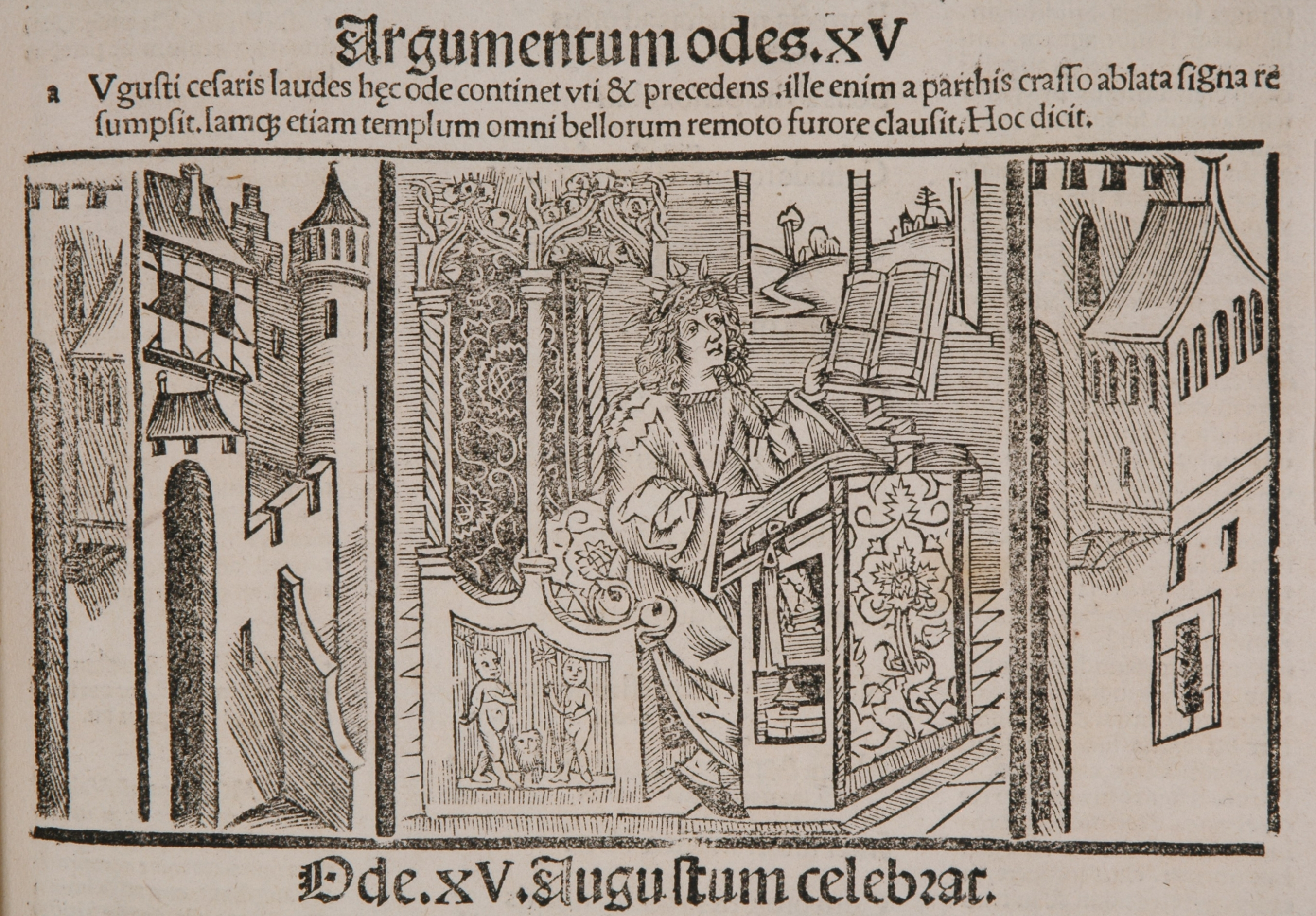 Horaz beim Studium. Holzschnitte, aus: Quintus Horatius Flaccus, Opera, Straßburg: Johann Grüninger, 1498. Gutenberg-Museum Mainz, Stb Ink 888